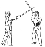 Eigene Zeichnung nach einer Grafik aus dem Buch: Yasuhiro Konishi: Kendo to shinai kyogi ,Verlag Kawazu shoten, Tokyo, 1952 S. 173